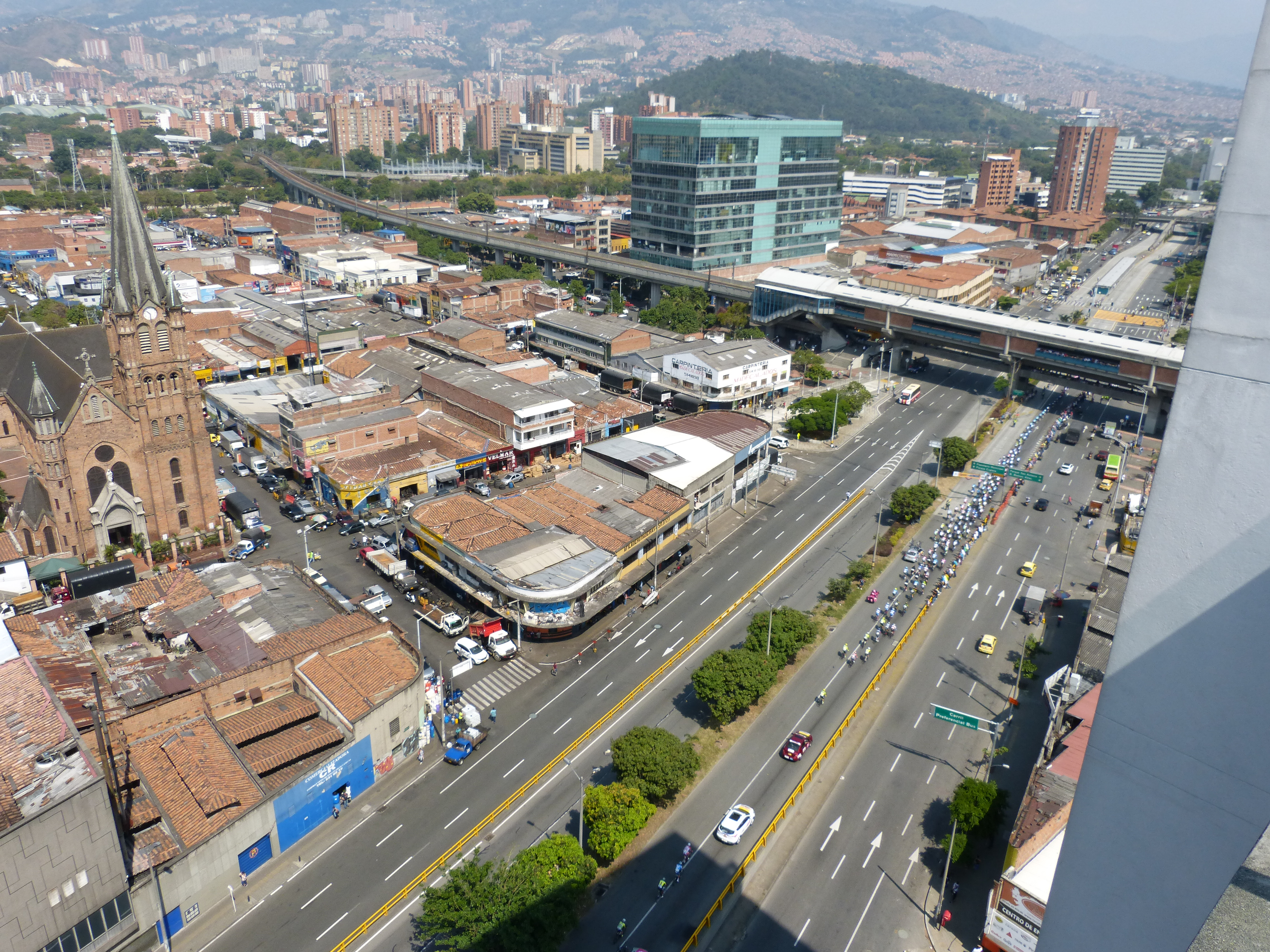 Vista aérea de la etapa 4 del Tour Colombia 2.1